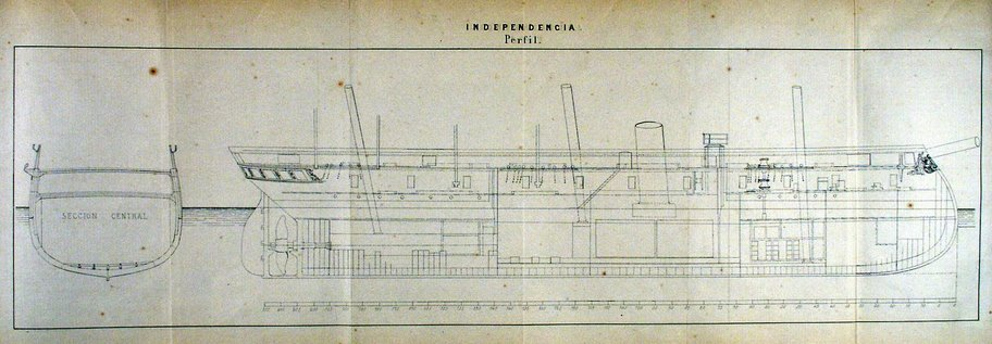 Esquema del perfil de la fragata blindada peruana Independencia (puede verse su espolón).